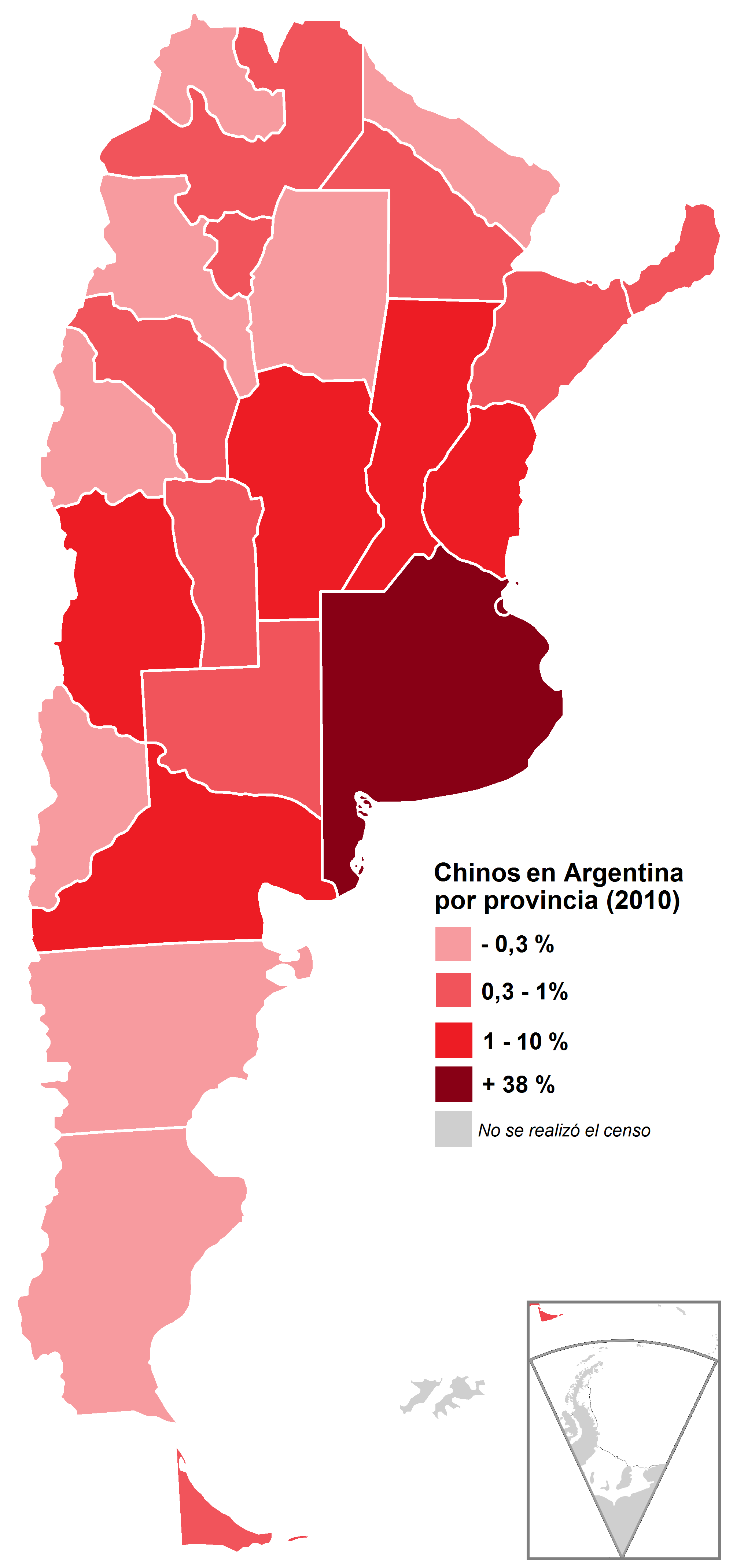 República Argentina por provincia. Población nacida en la República Popular de China (no Taiwán), en porcentaje. Año 2010. Fuente: Censo 2010 - INDEC.